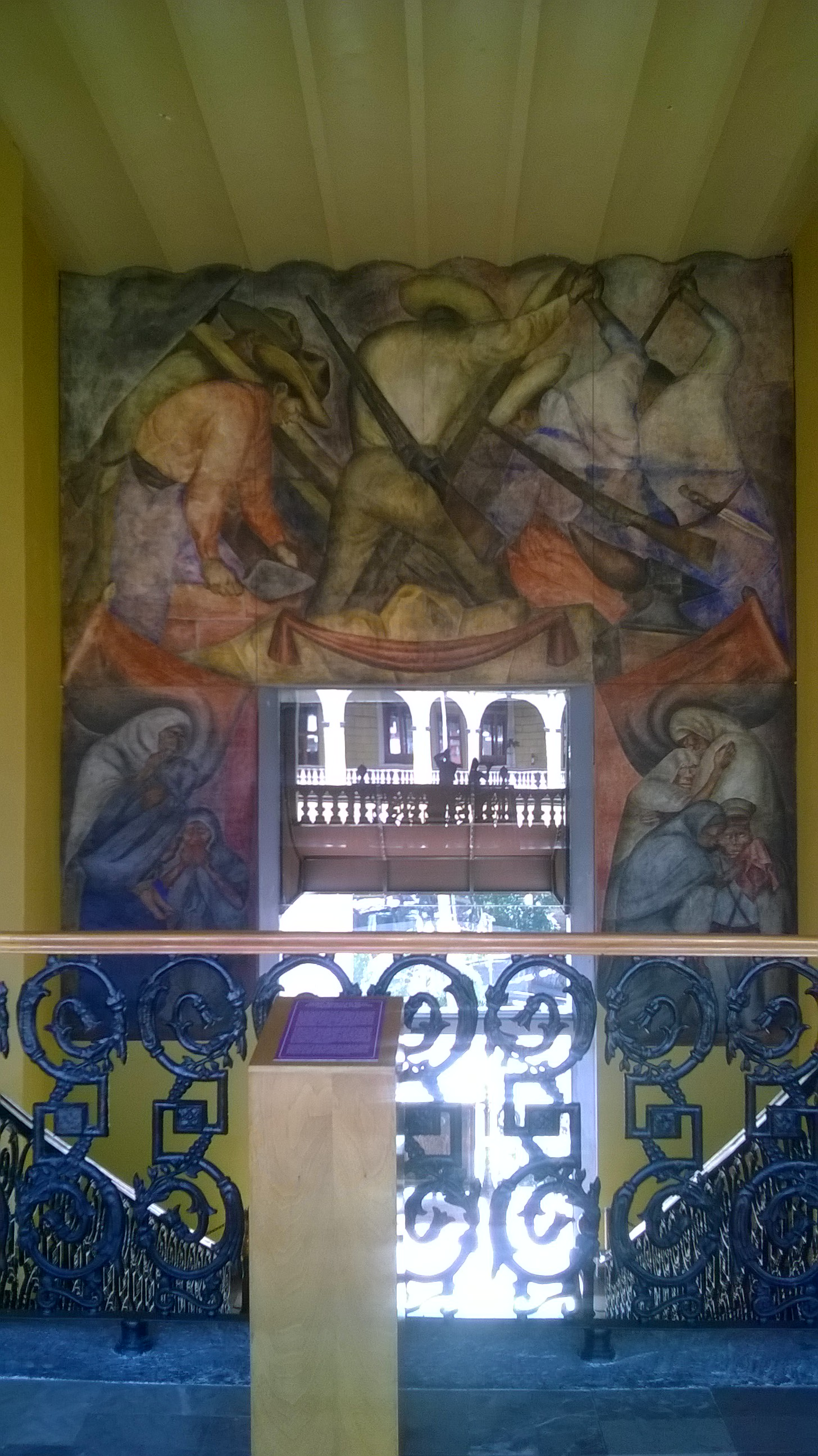 Mural ubicado en el interior del Palacio Municipal de Orizaba